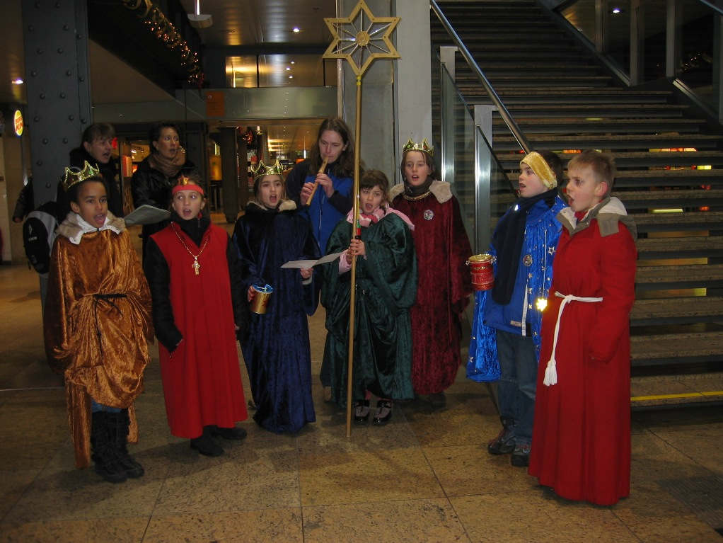 Dreikönigen-Singen im HBf Köln